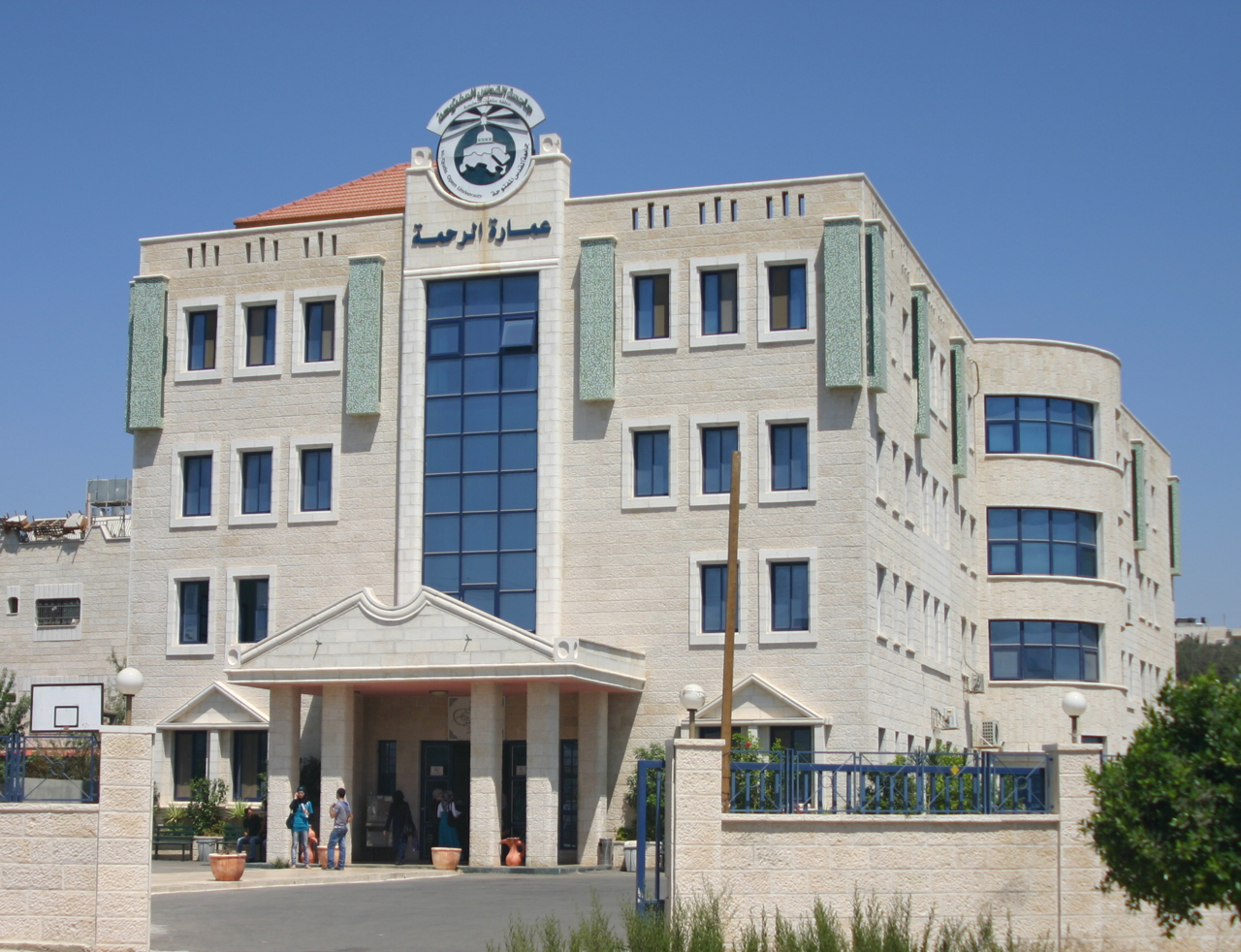 Salfeet, Palästina.